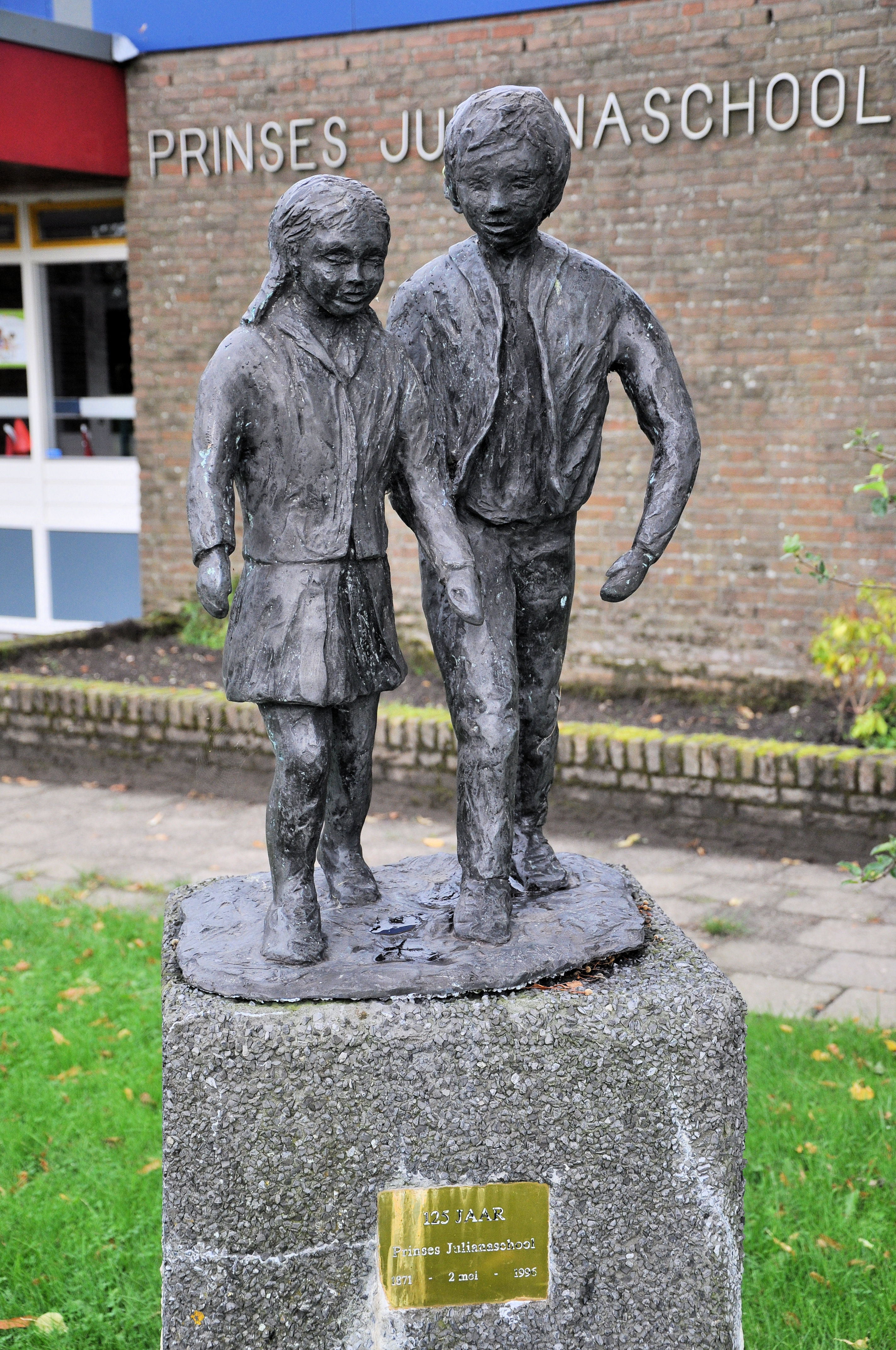 Herinnering aan het 125-jarig bestaan 1996-5-2 Unknown